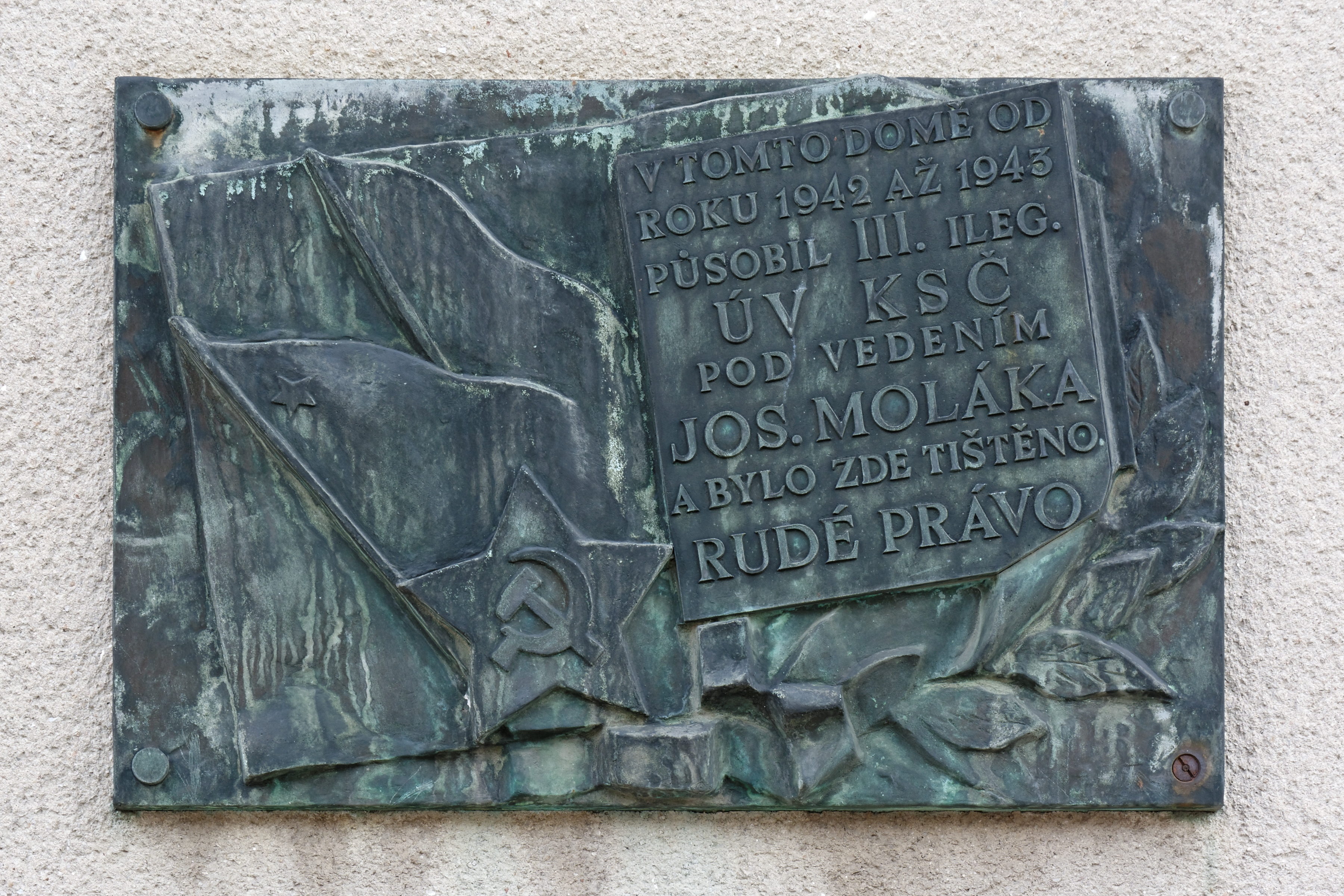 Vila Zvonařova 10, Zvonařova 500/10, Beroun. Pamětní deska: "V tomto domě od roku 1942 až 1943 působil III. ileg. ÚV KSČ pod vedením Jos. Moláka. Bylo zde tištěno Rudé právo."